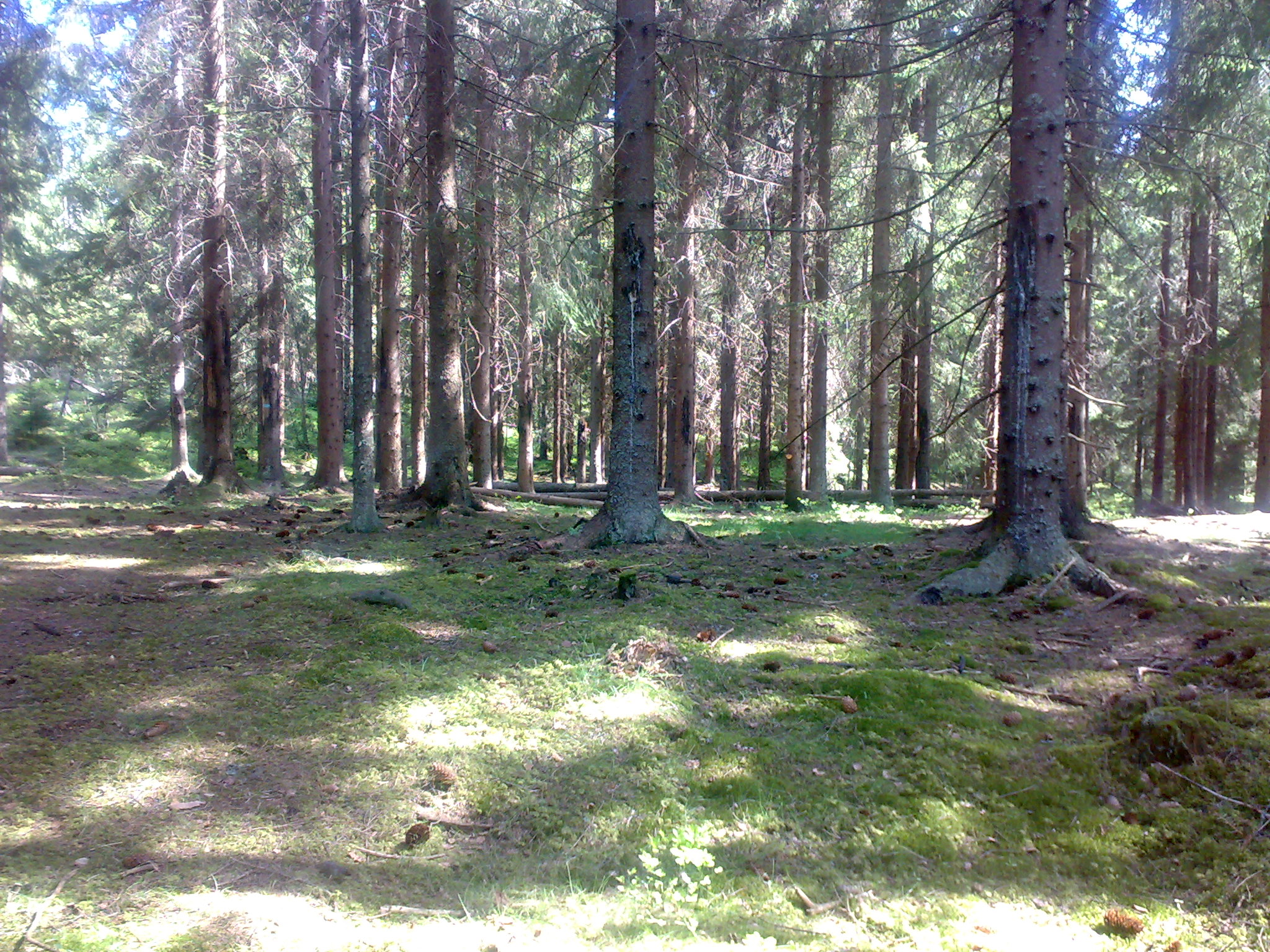 Granskog Spruce-woods Oslo Norway